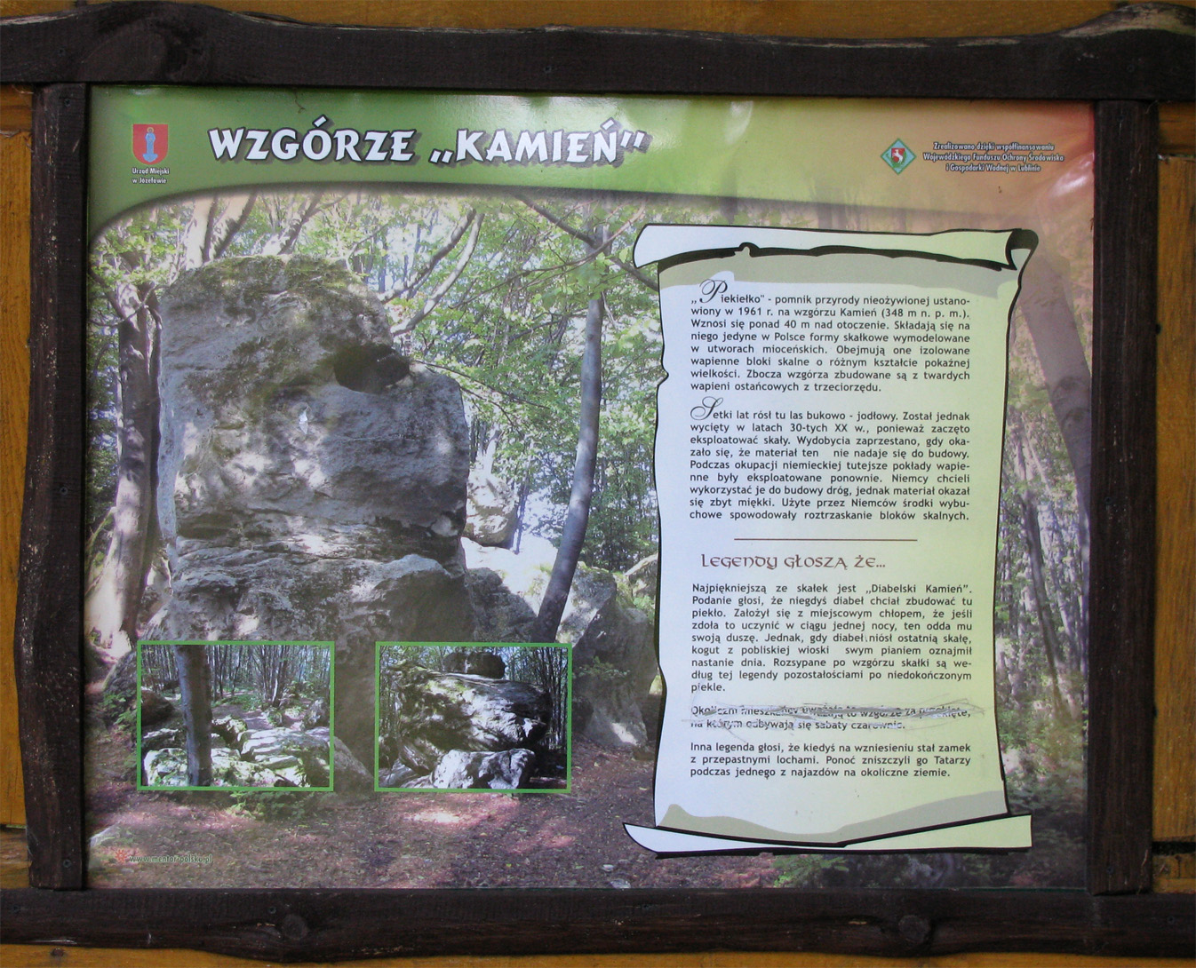 Tablica przy ścieżce przyrodniczej na wzgórze Kamień na Roztoczu Środkowym